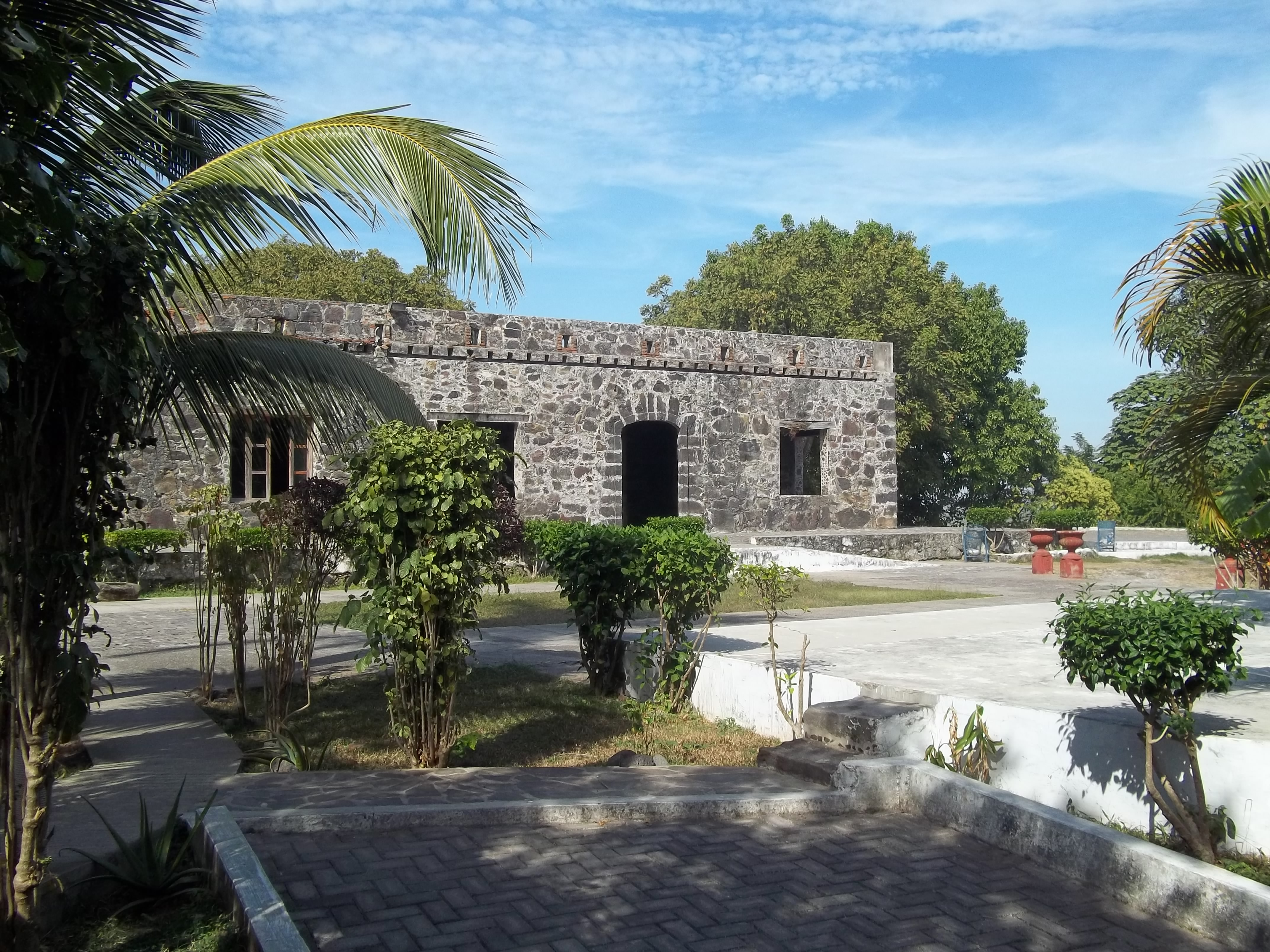 La Contaduría